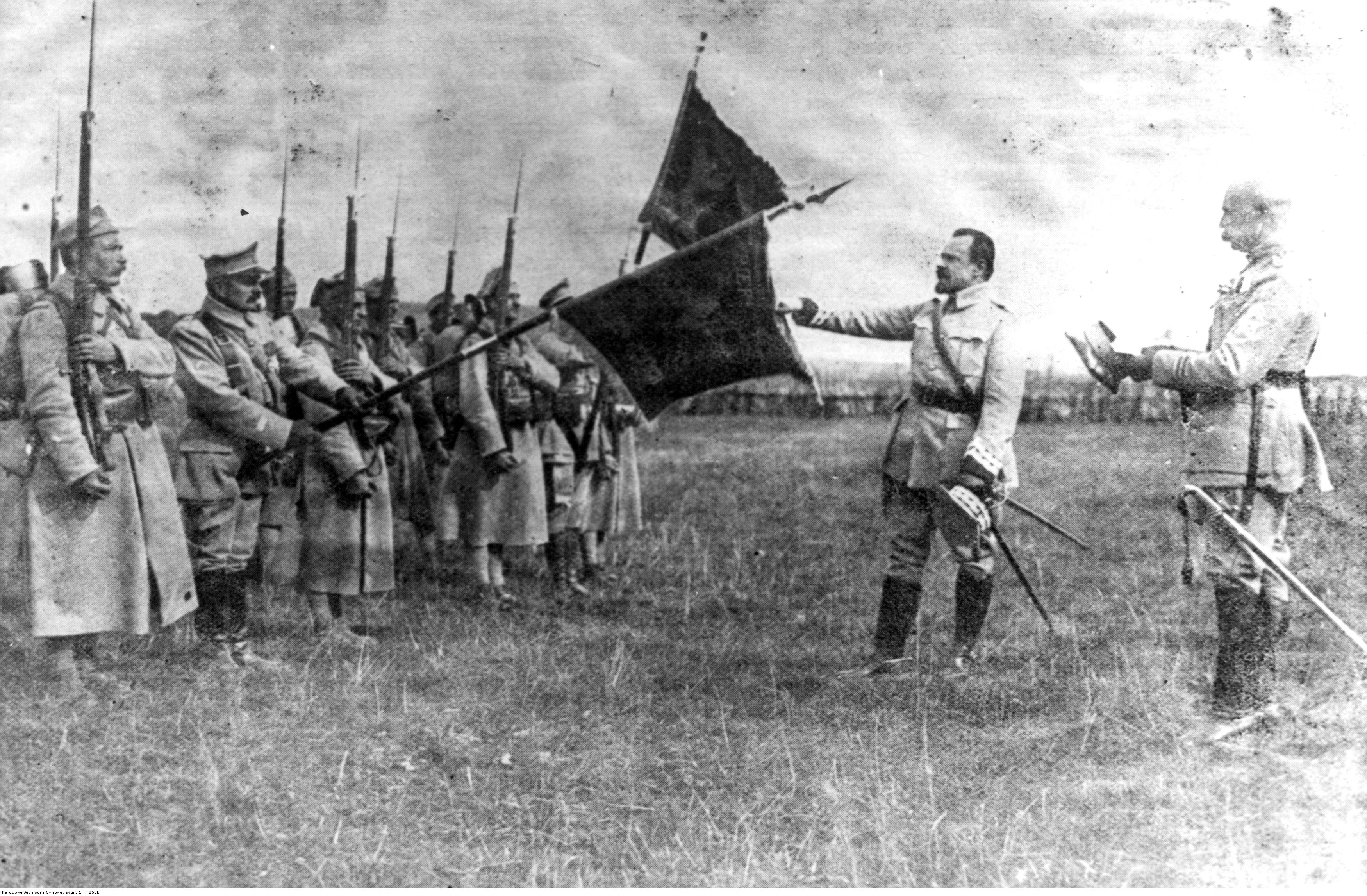 Armia polska we Francji - objęcie dowództwa przez generała Józefa Hallera. Generał Józef Haller (drugi z prawej) składa przysięgę jako naczelny wódz. Koncern Ilustrowany Kurier Codzienny - Archiwum Ilustracji. Sygnatura: 1-H-260b